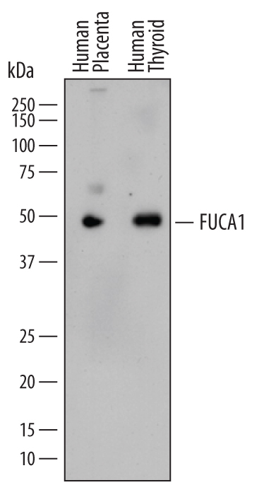 marcação microscopia alfa fucosidase